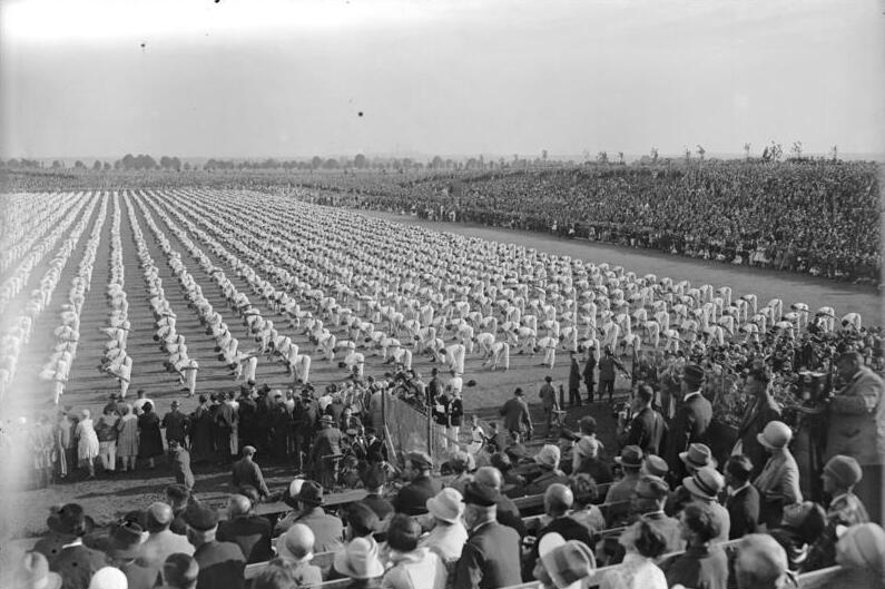 Das XIV. große deutsche Turnfest in Köln/Rh., Massenfreiübungen von 30.000 Turnern auf der Jahnwiese in Köln. Aufnahmen unseres nach Köln entsandten Sonder-Bild-Bereichterstatters! Blick auf das ungeheure Feld von 30.000 Turnern während der Freiübungen.